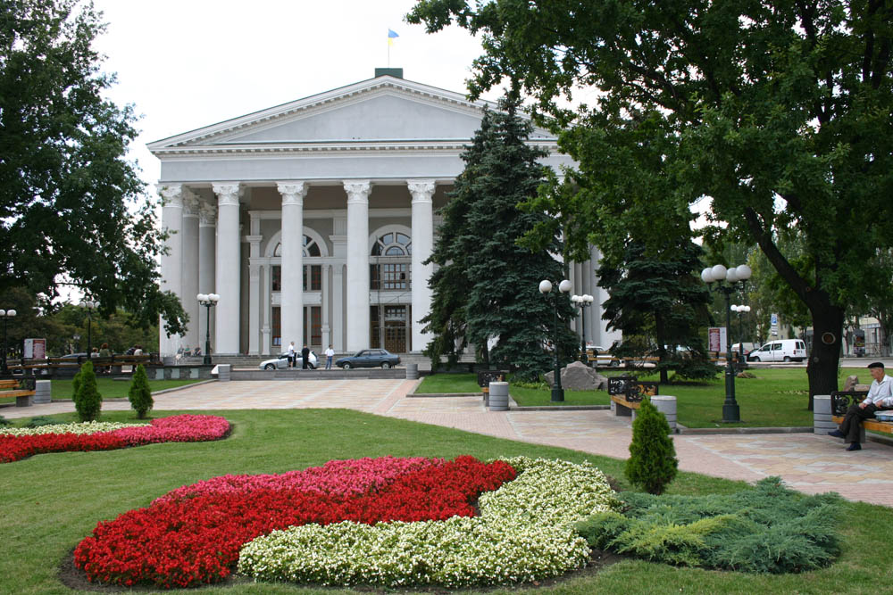 Beschreibung: Stadtansicht Donezk Ursprung: Selbst fotografiert von Sven Teschke am 13. August 2004 Lizenzstatus: GNU FDL